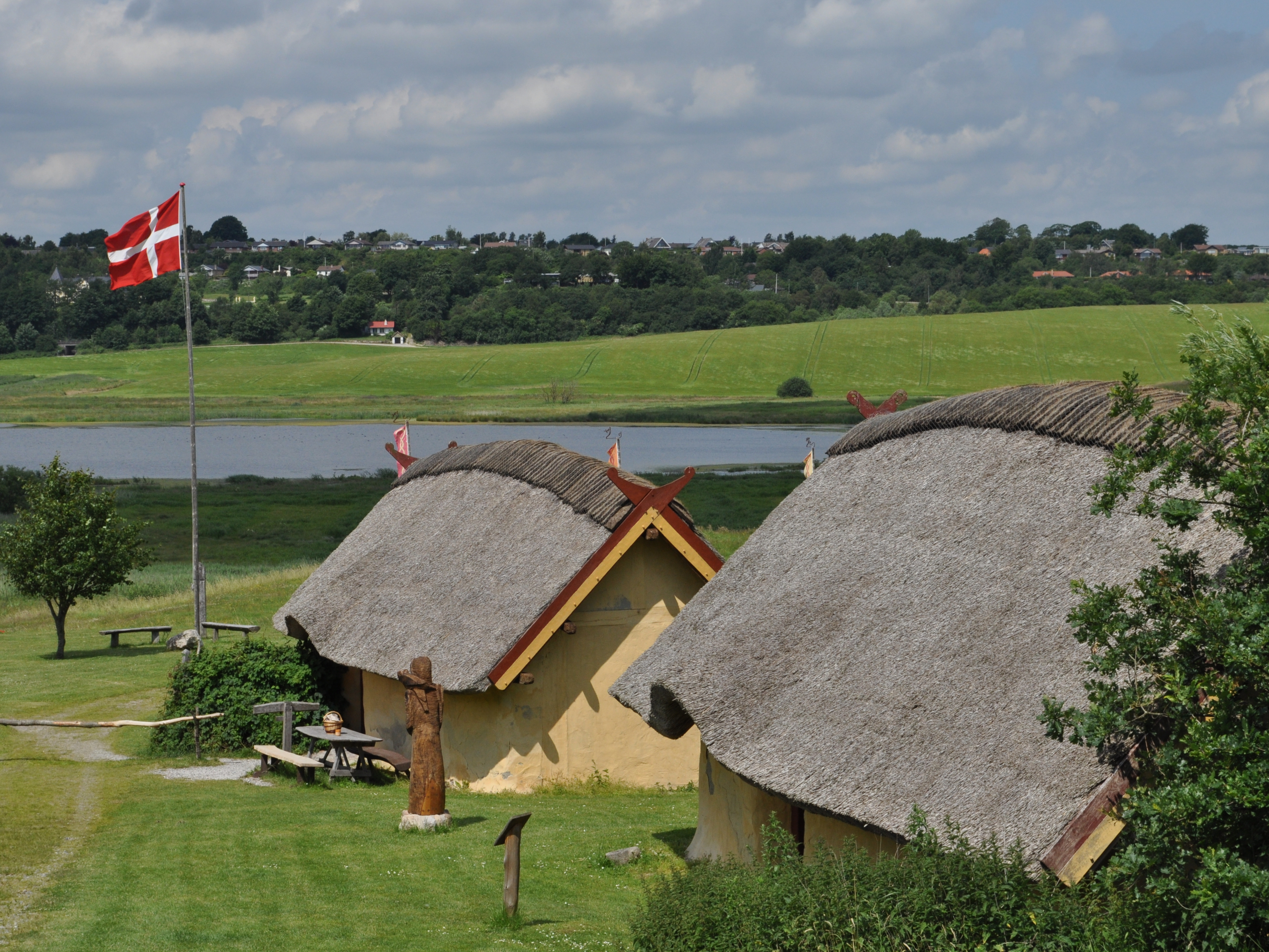 Fyrkat viking center